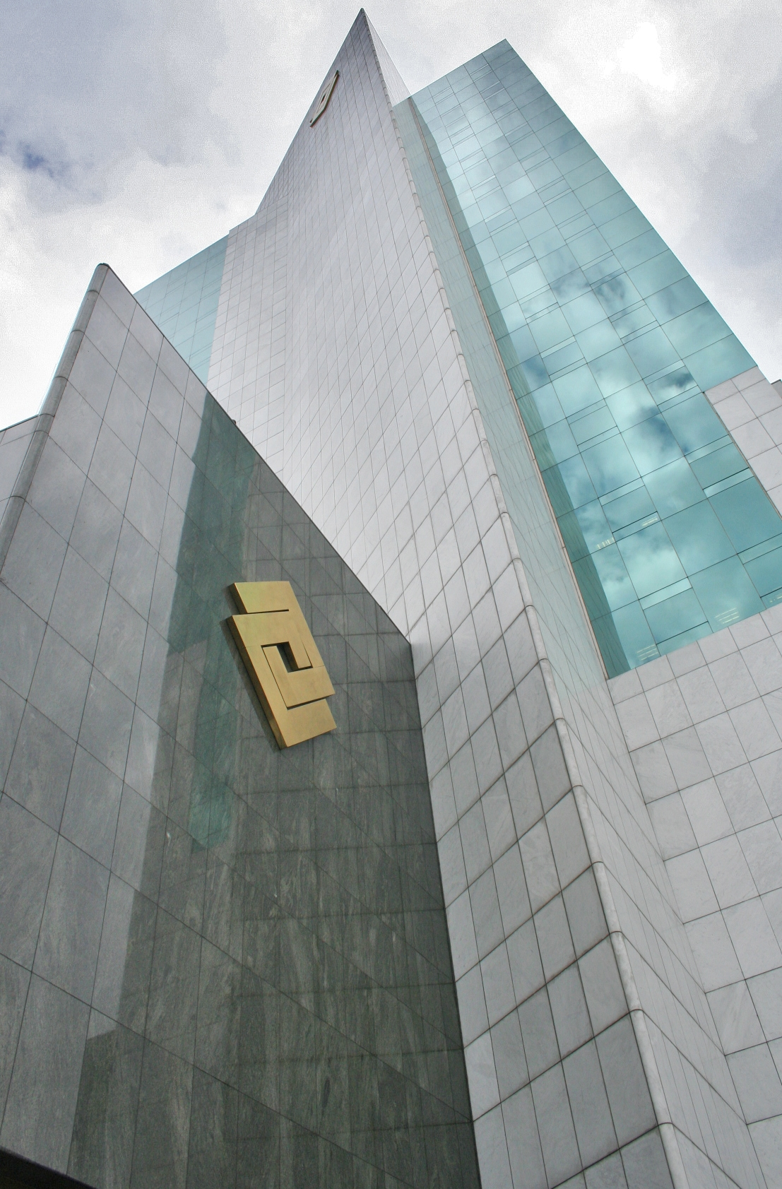 Edificio Banco de Occidente, Cali, Colombia